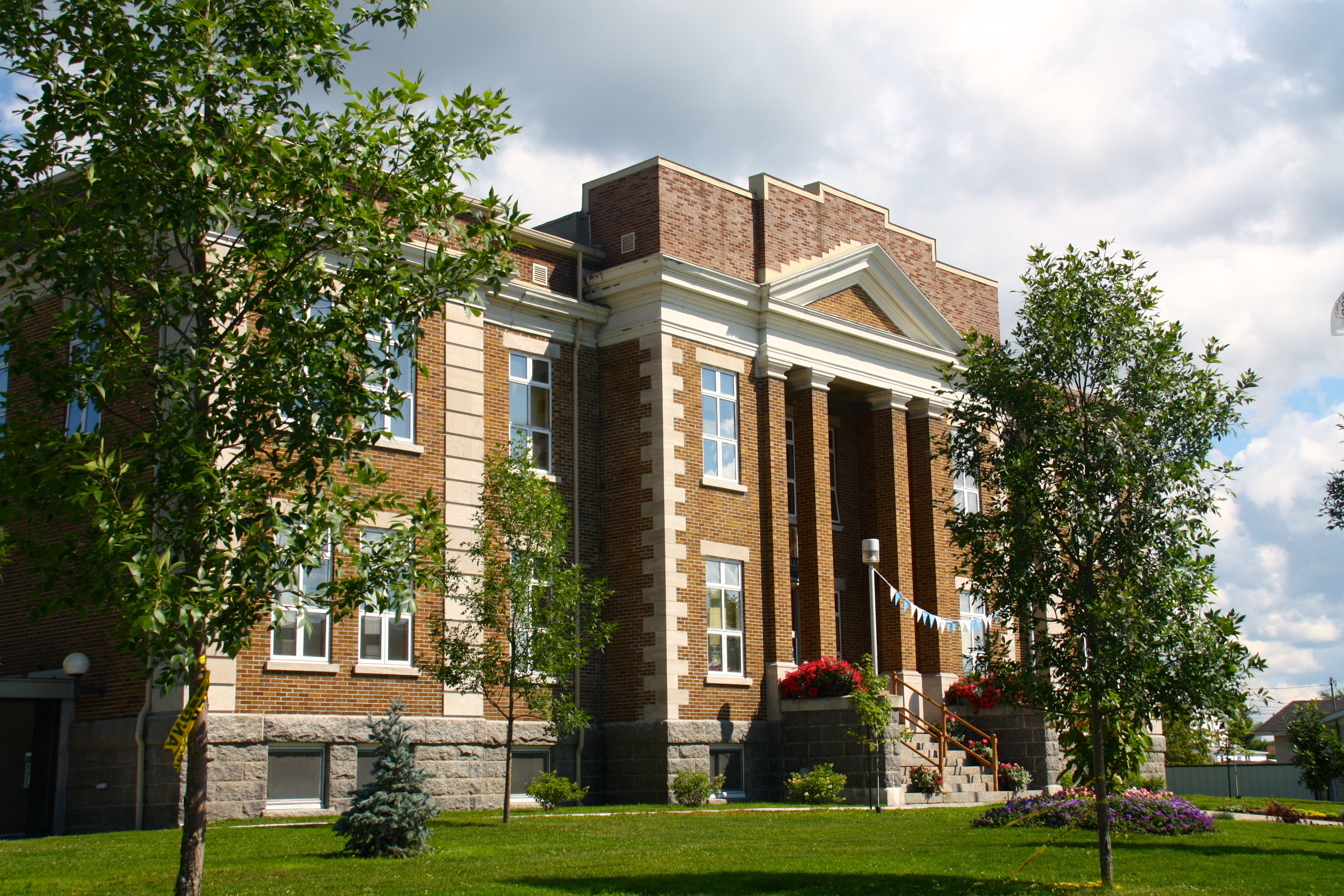 Ancien palais de justice, 101, 3e Avenue Est, Amos (Canada). (Protection IP cité. Voir la liste des lieux patrimoniaux de l'Abitibi-Témiscamingue pour plus de détails).